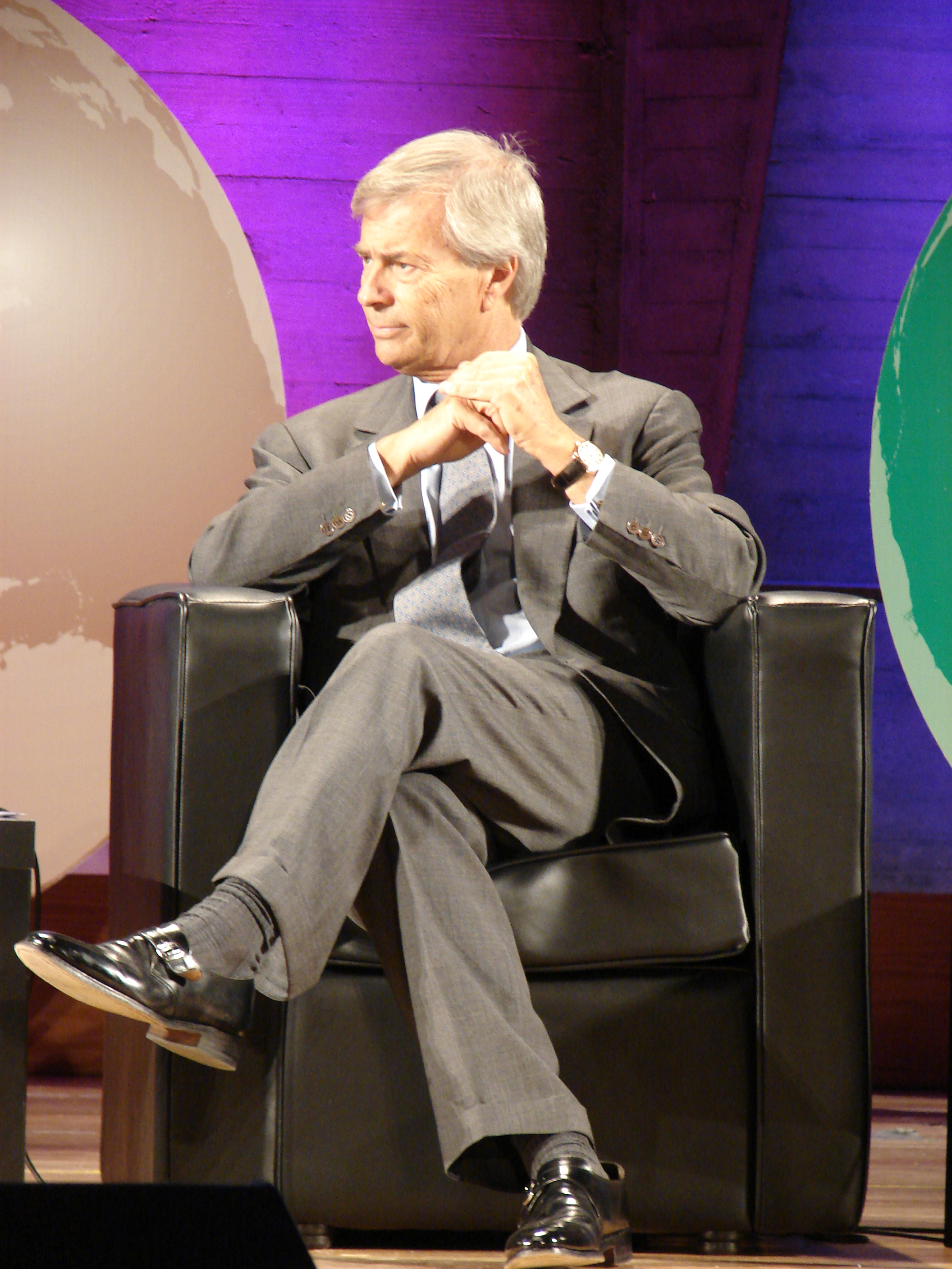 Vincent Bolloré à la Global Conference